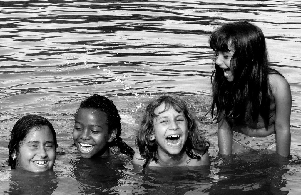 Imaginando o oceano, as crianças brincam na poça d'água